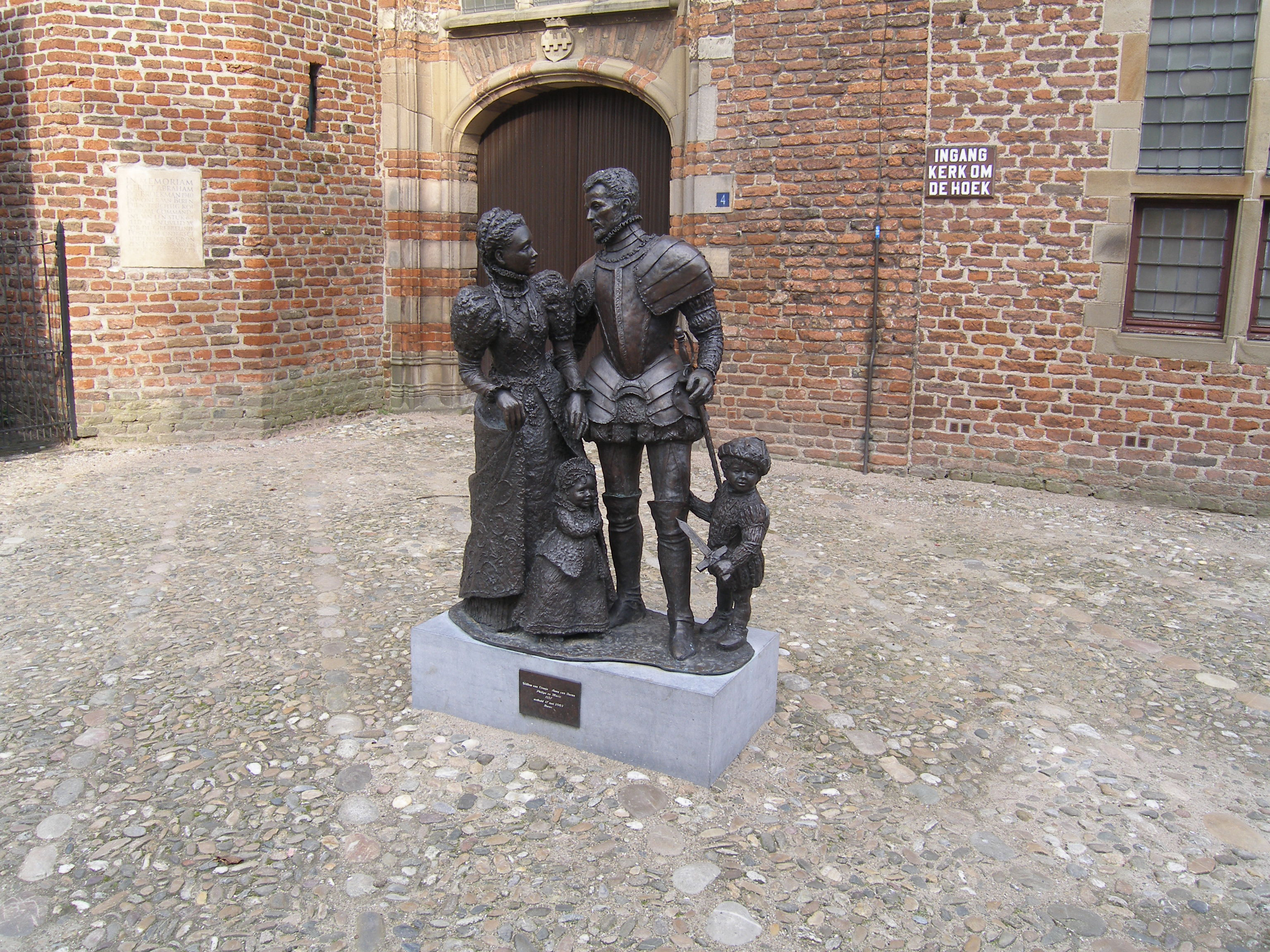 Standbeeld van Willem van Oranje en Anne van Buren (jwt 24-03-2007), gemaakt door Lia Krol en Caroline van 't Hoff in 2003